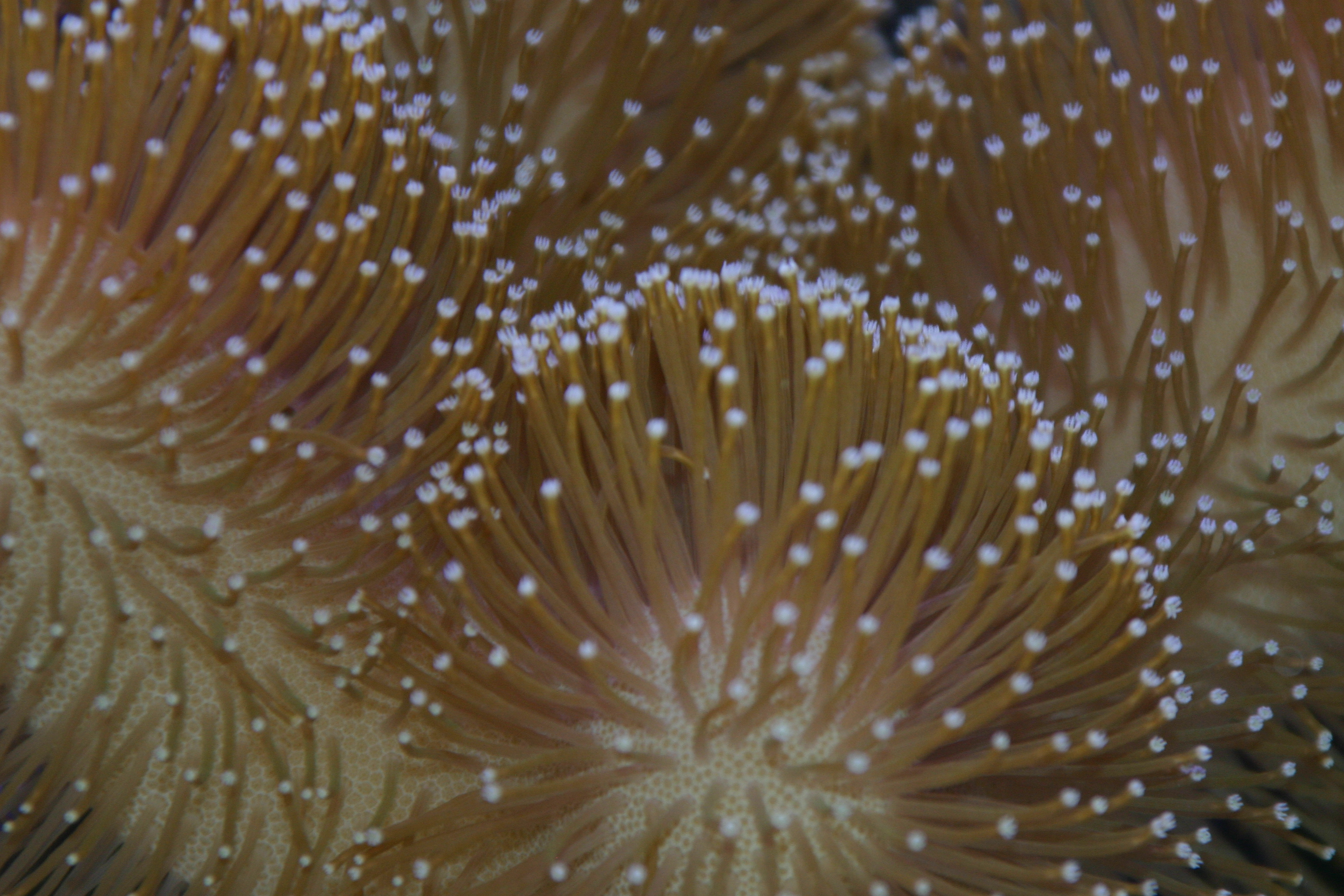 sarcophyton con todos los pólipos expandidos